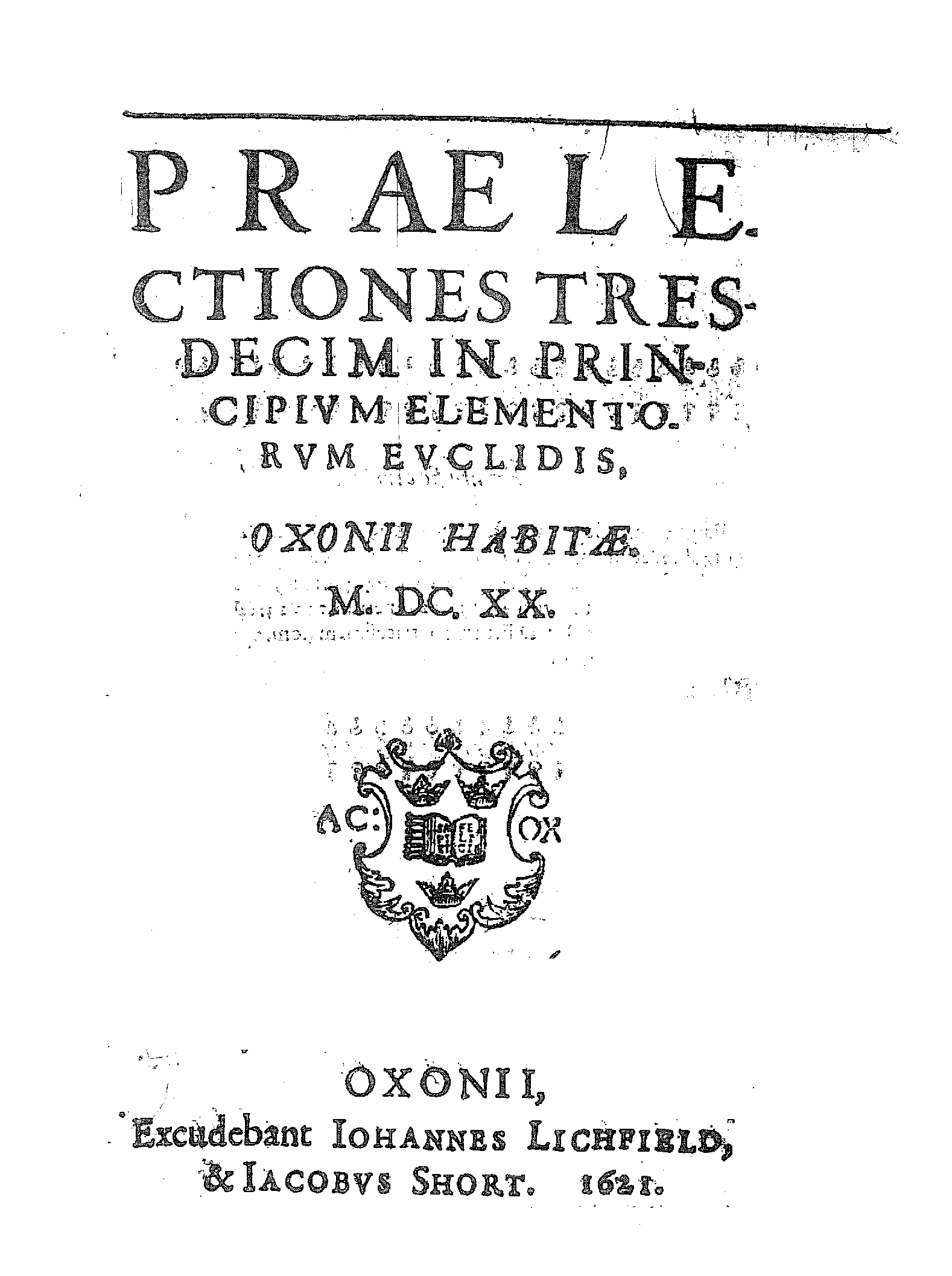 Praelectiones tresdecim in principium elementorum Euclidis, Oxonii habitae. 1620. - Oxonii : excudebant Iohannes Lichfield, & Iacobus Short, 1621. - [4], 260 p. : ill. ; 4°. - L'identità dell'autore si desume dalla carta A2r .